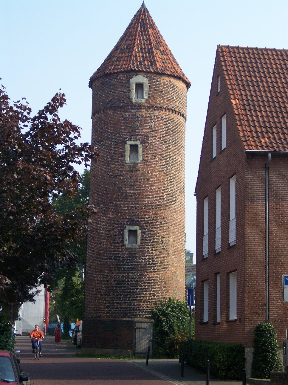 Lorenkenturm